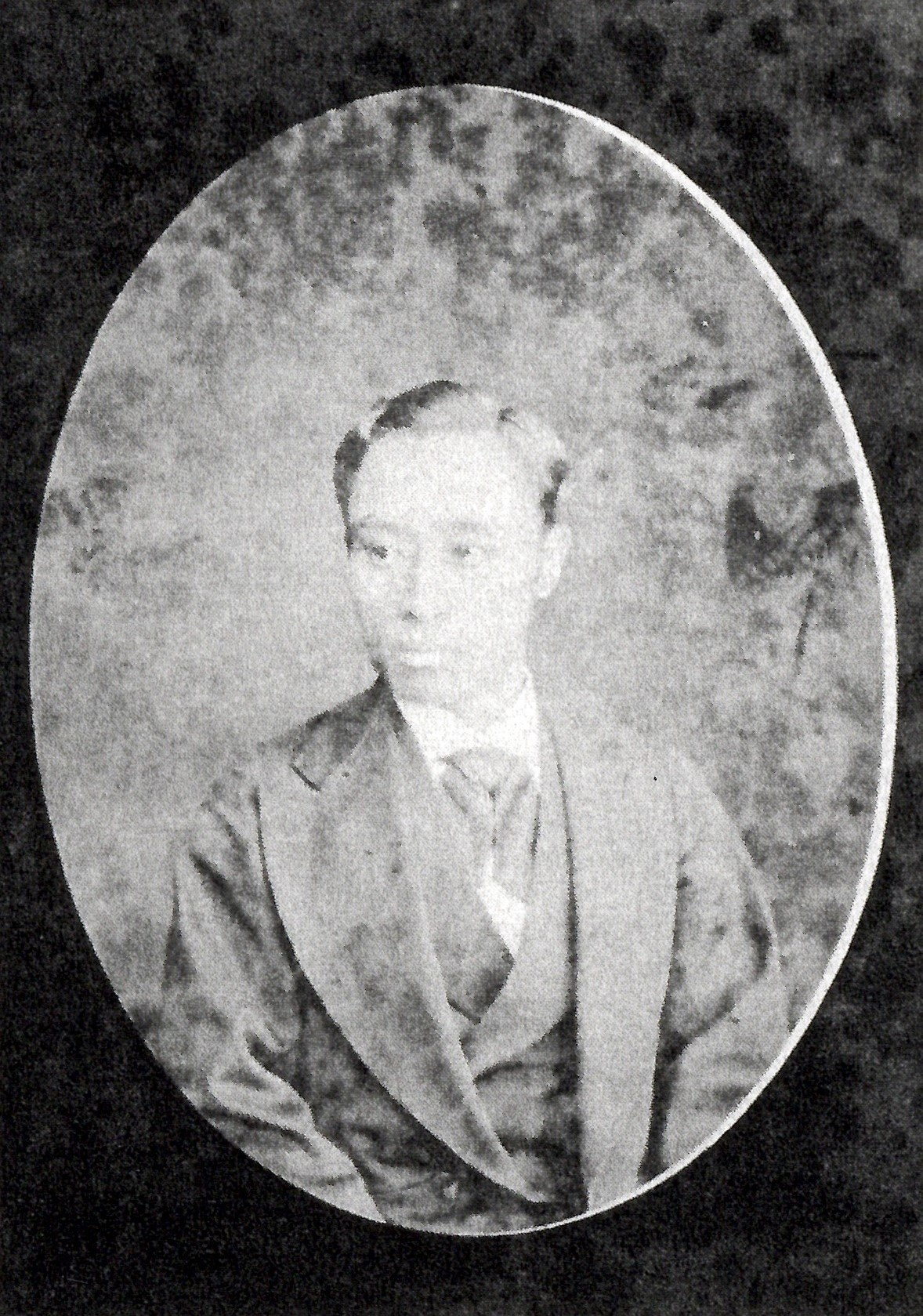 冷泉為柔の肖像写真。